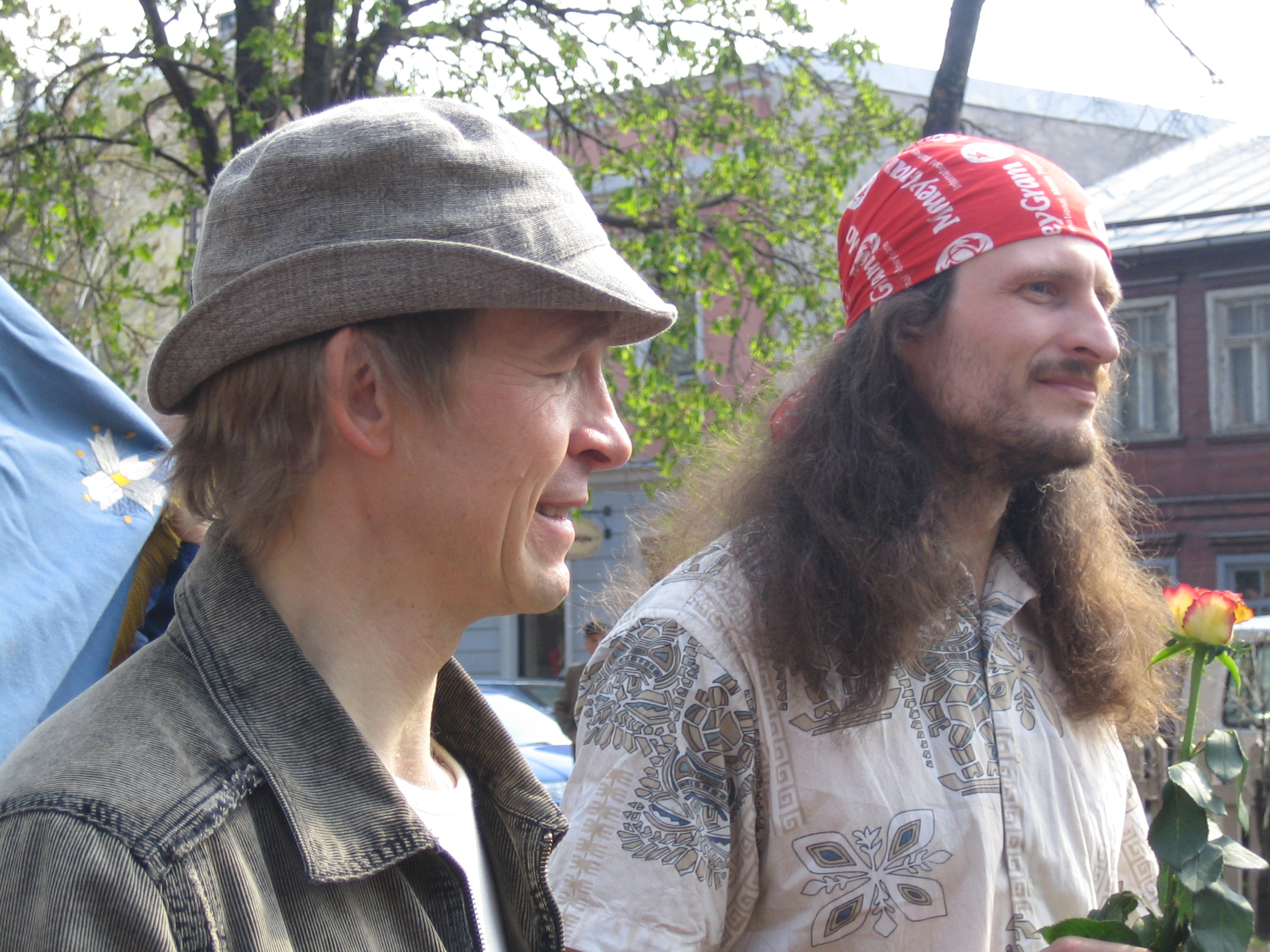 Авторы_памятника "Трубочист и каменщик"